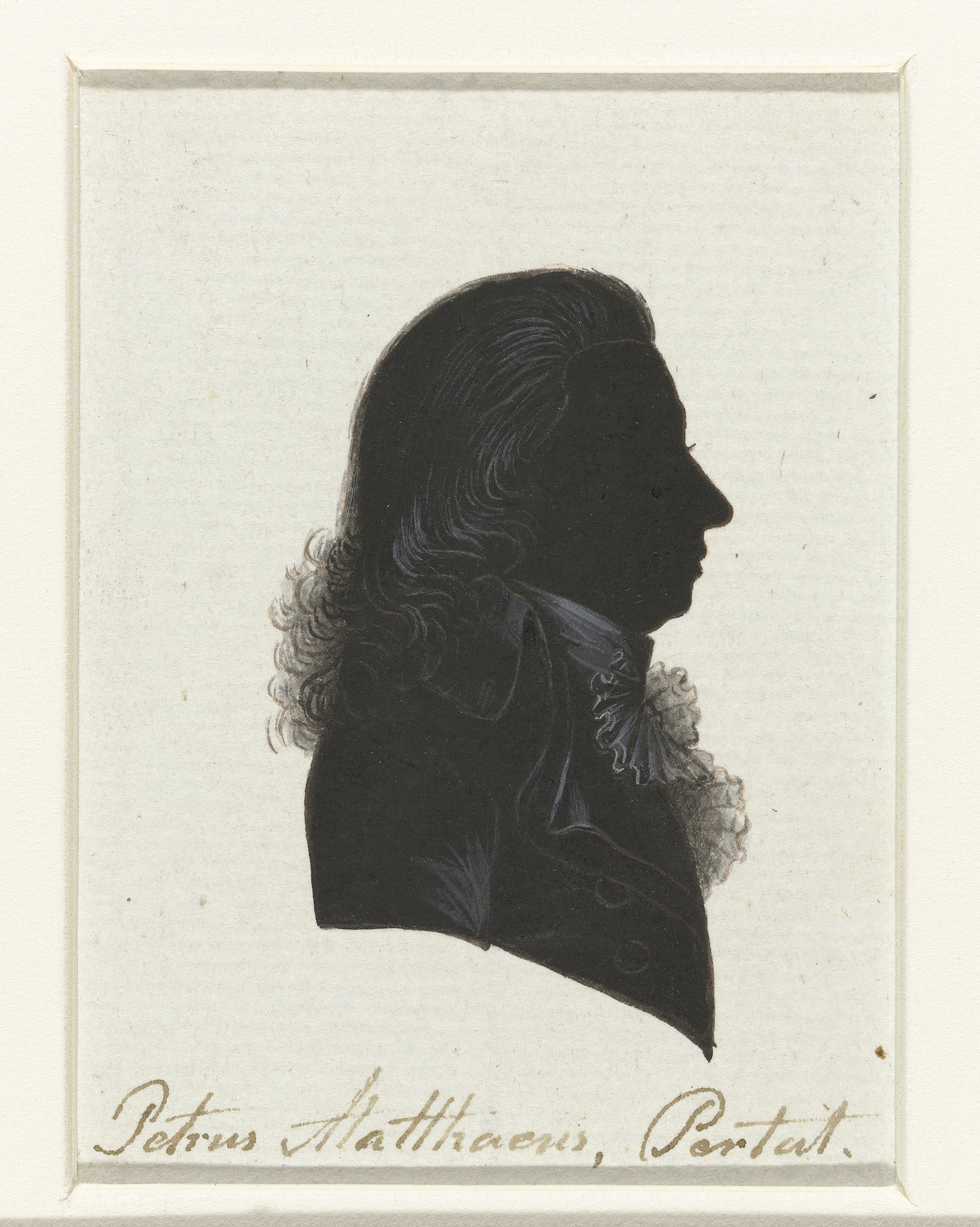 P.M. Pertat. Tekening in Oost-Indische inkt, waarschijnlijk gemaakt door Hausdorff. De tekening behoort tot een serie van portretten van afgevaardigden naar de Eerste Nationale Vergadering in 1796-1797. Van de serie werden gravures gemaakt die zijn afgedrukt in "Geschiedenis der staatsregeling, voor het Bataafsche volk", een boek van Cornelius Rogge (1799).